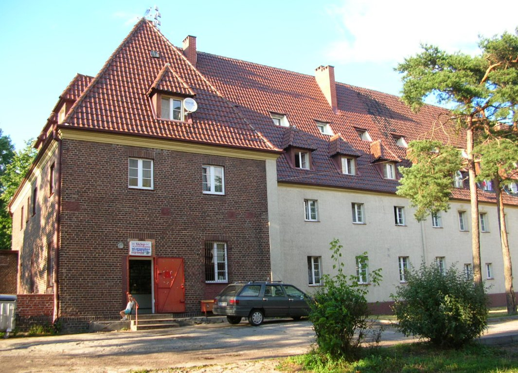 Osiedle Awaryjne (ul. Świetlicowa) w Bydgoszczy